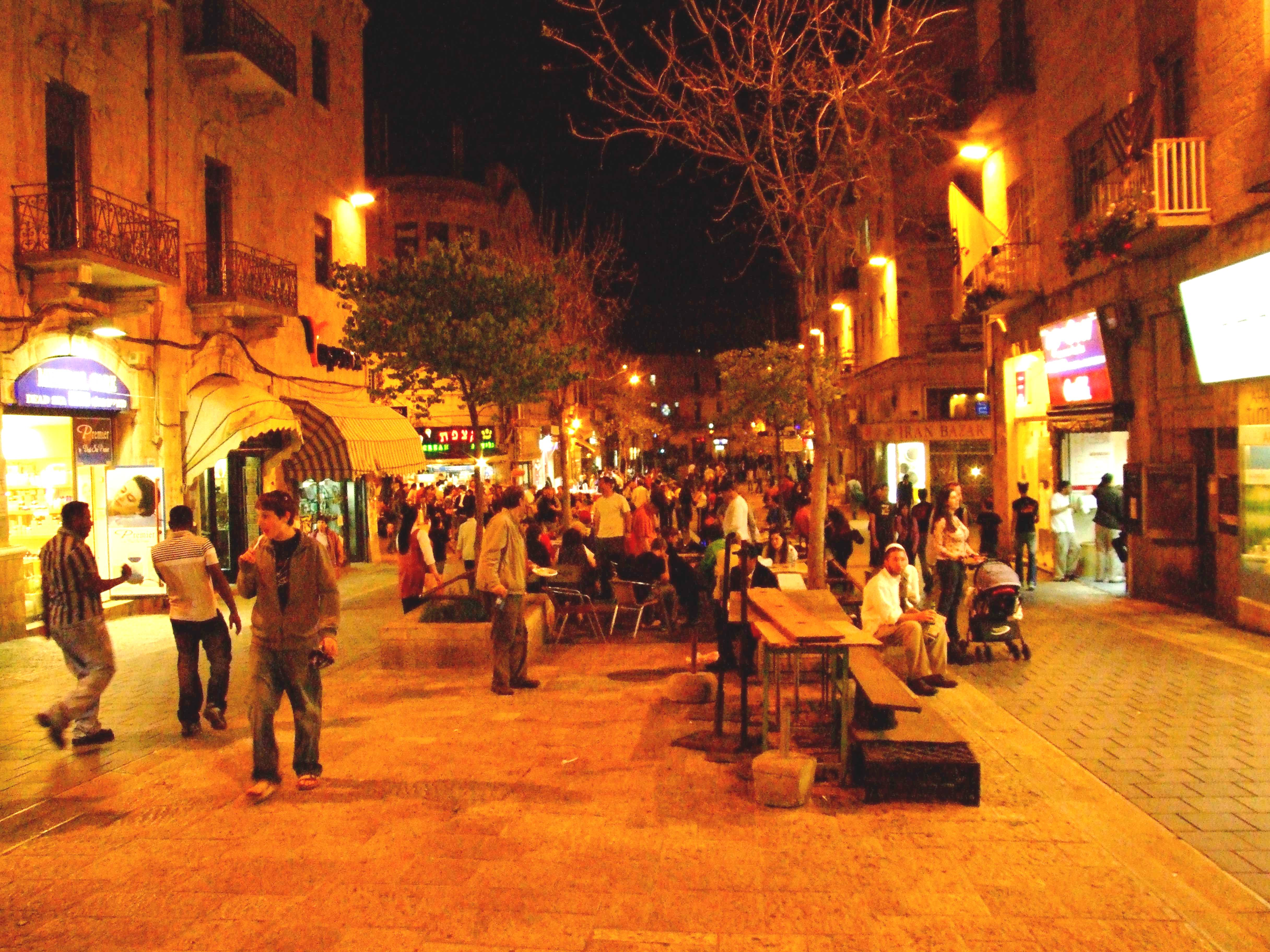 Midrachov_jerusalem_mozesy2 En : Ben Yehuda Street at night